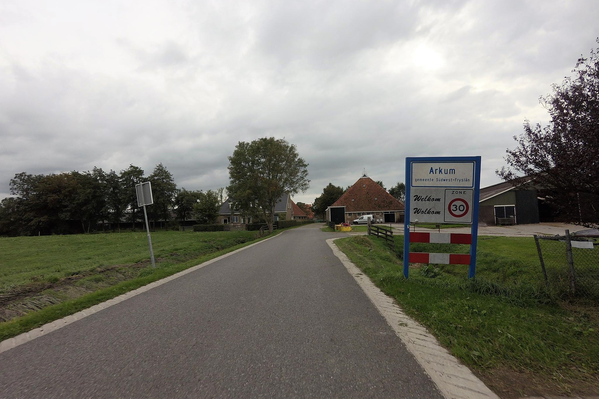 Arkum, buurtschap in Súdwest-Fryslân